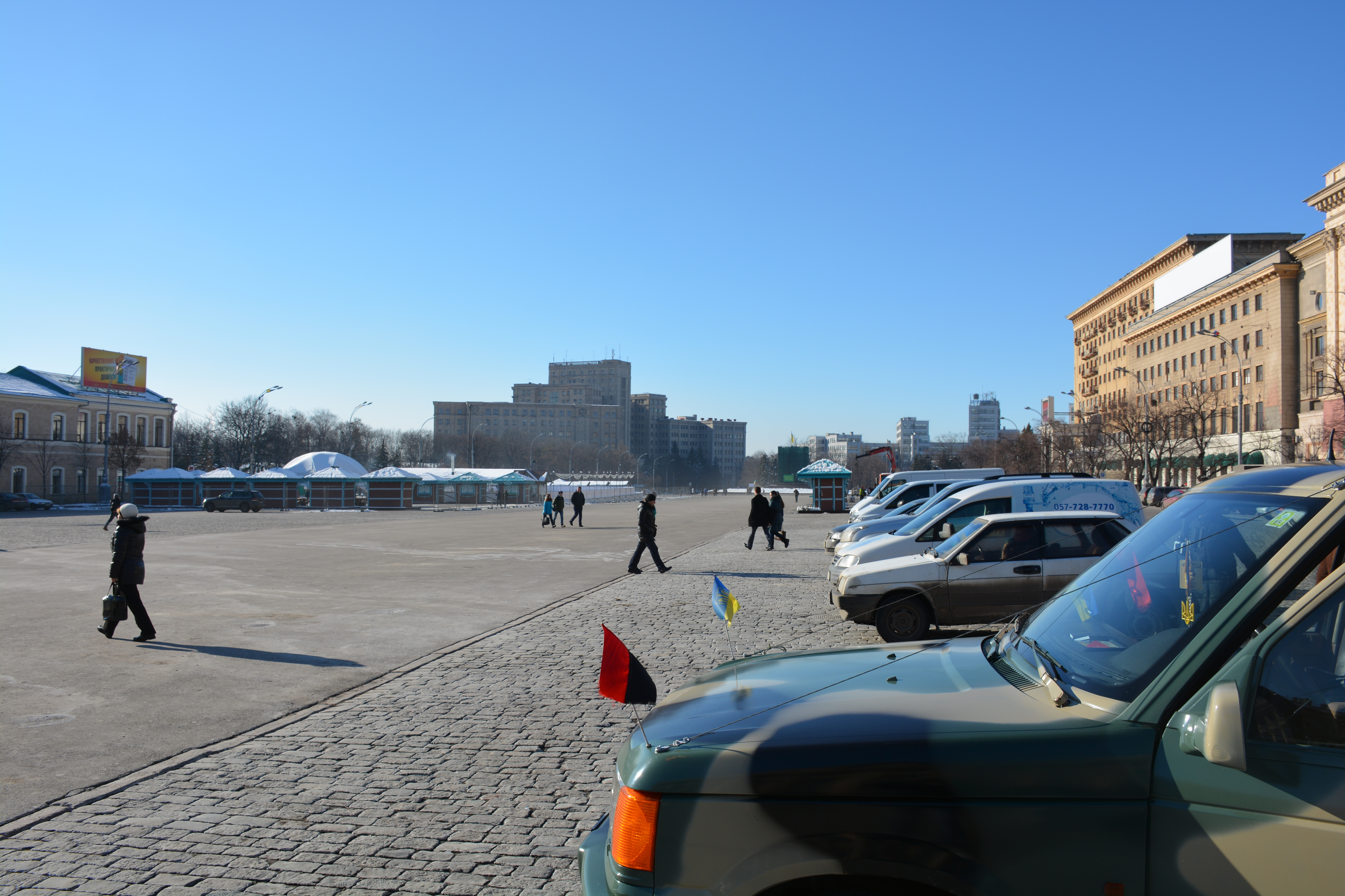 Ukrainereise / Donbass